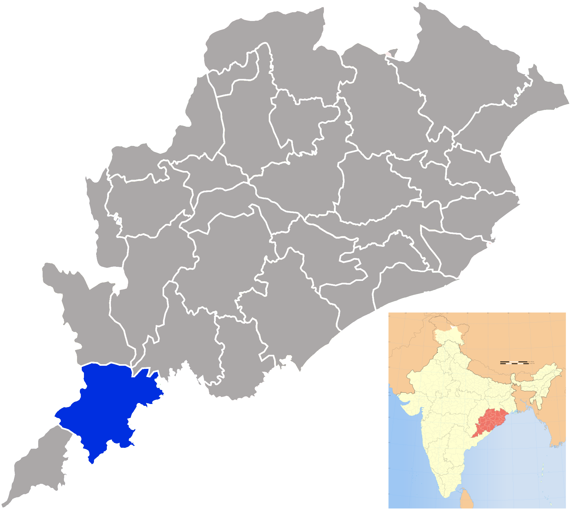 Distrito de Koraput en Orissa